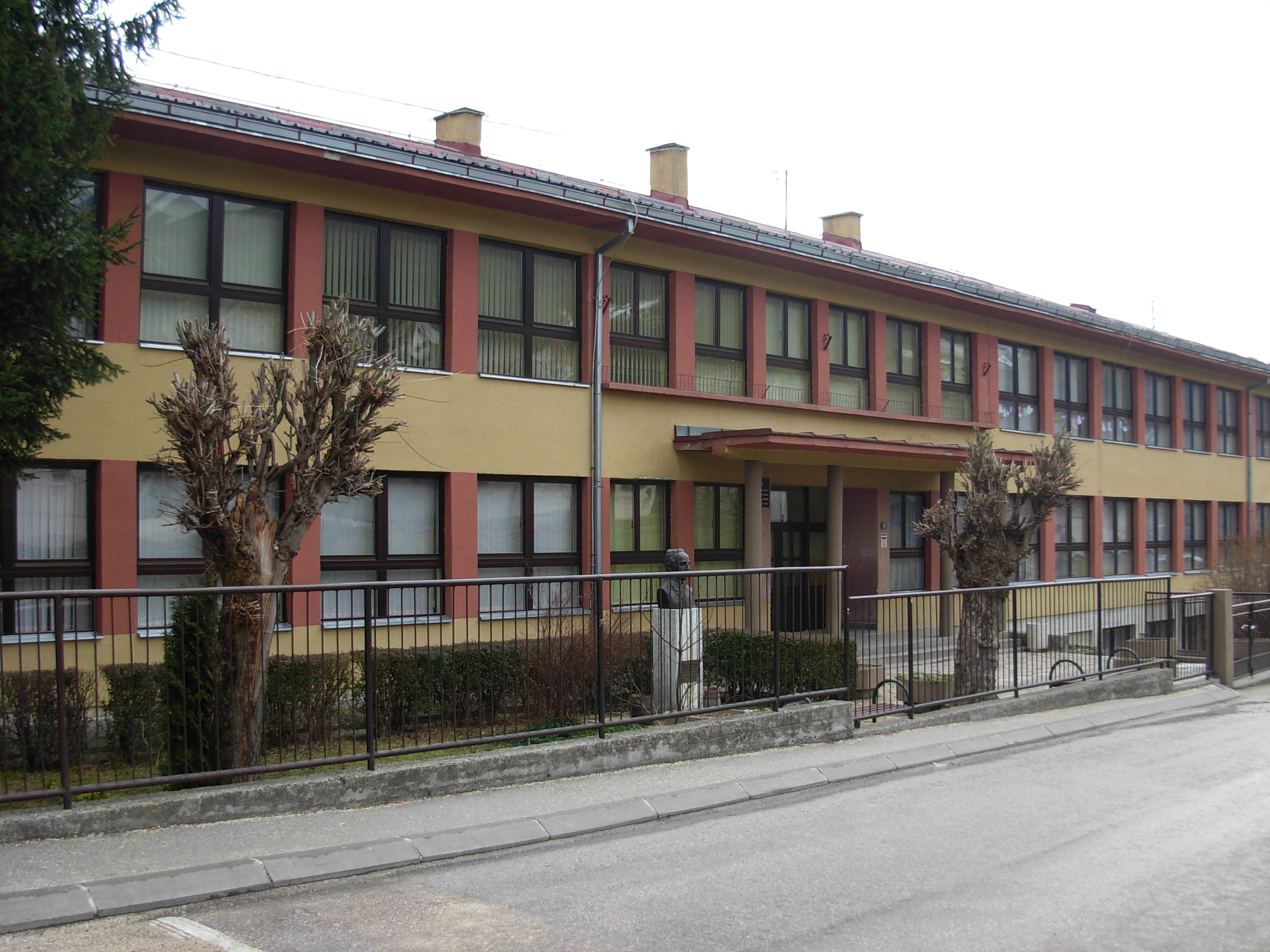 Osnovna škola Petar Kočić, Mrkonjić Grad.